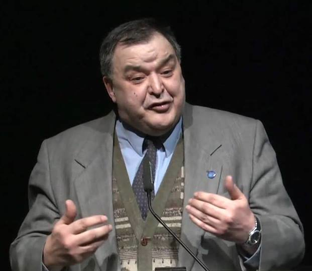 Photo de Gilles Rhéaume en train de donner un discours.